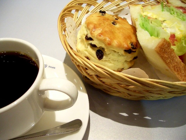 ごちそうさま♪ from Nagasaki, Japan